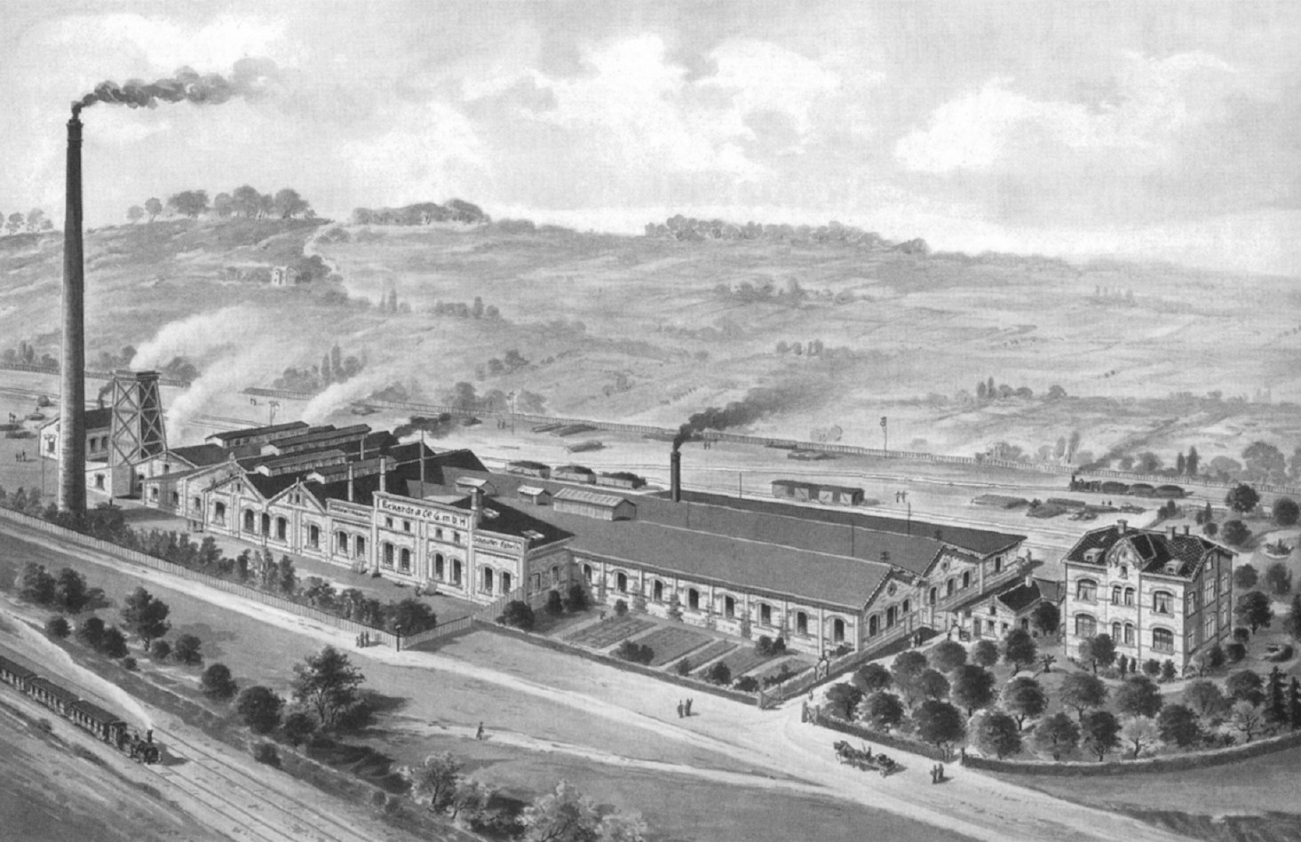 Herdecke, Schaufel- und Spatenfabrik Eckardt & Co GmbH, Gesamtansicht des Werkes kurz nach Gründung (1899)